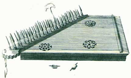 Quanoun datant du XIXe siècle : on note l'absence de peaux de résonance et de leviers d'altération